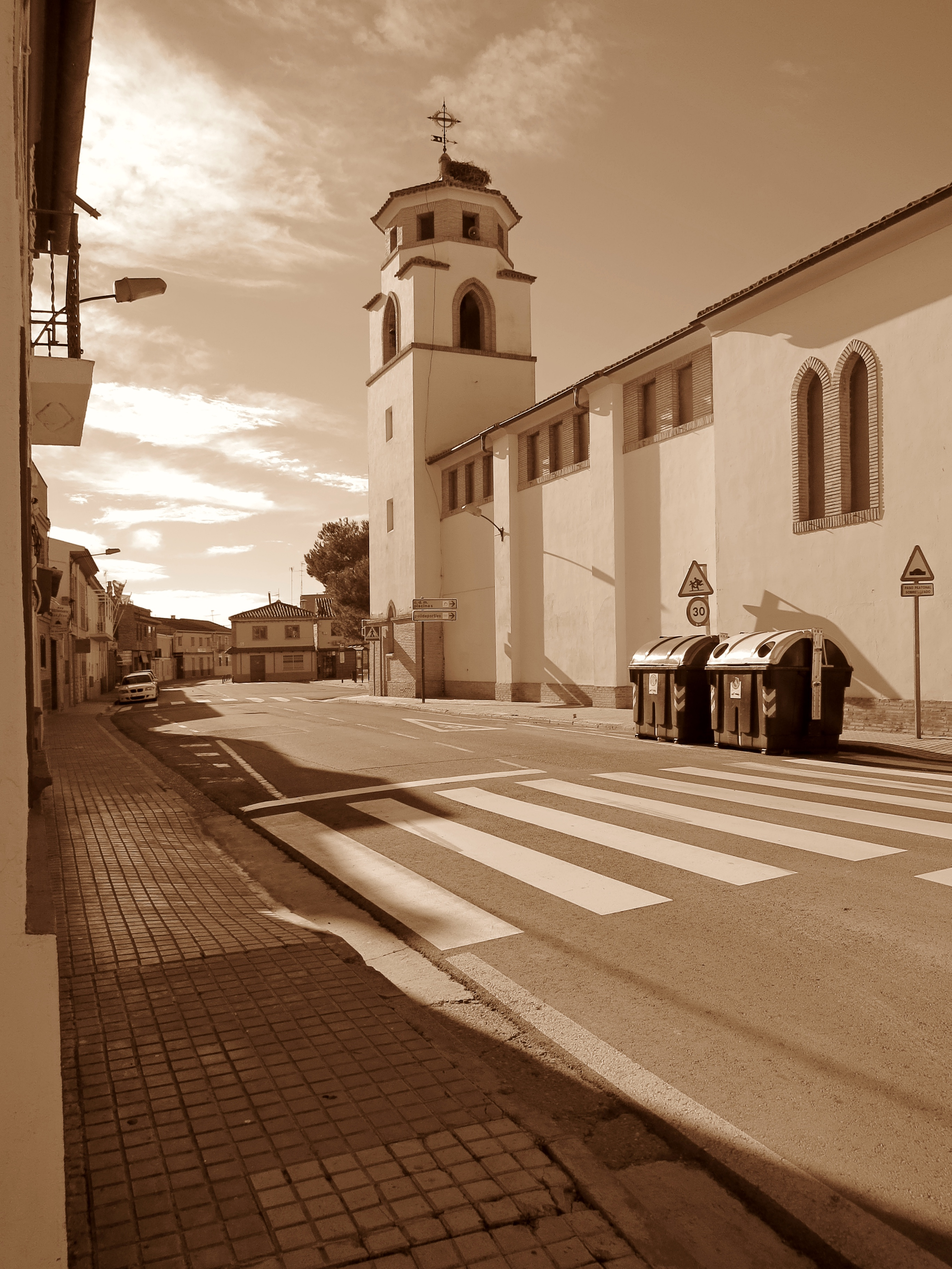 Zaragoza (Aragón, España) - Calle del Comercio e iglesia de San Juan Bautista en San Juan de Mozarrifar.